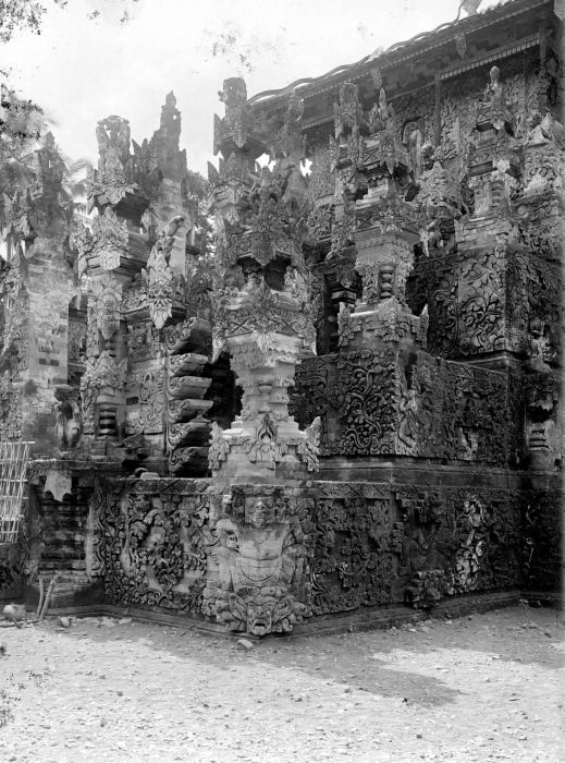 Negatief. Beeldhouwwerk op de Pura Beji te Sangsit